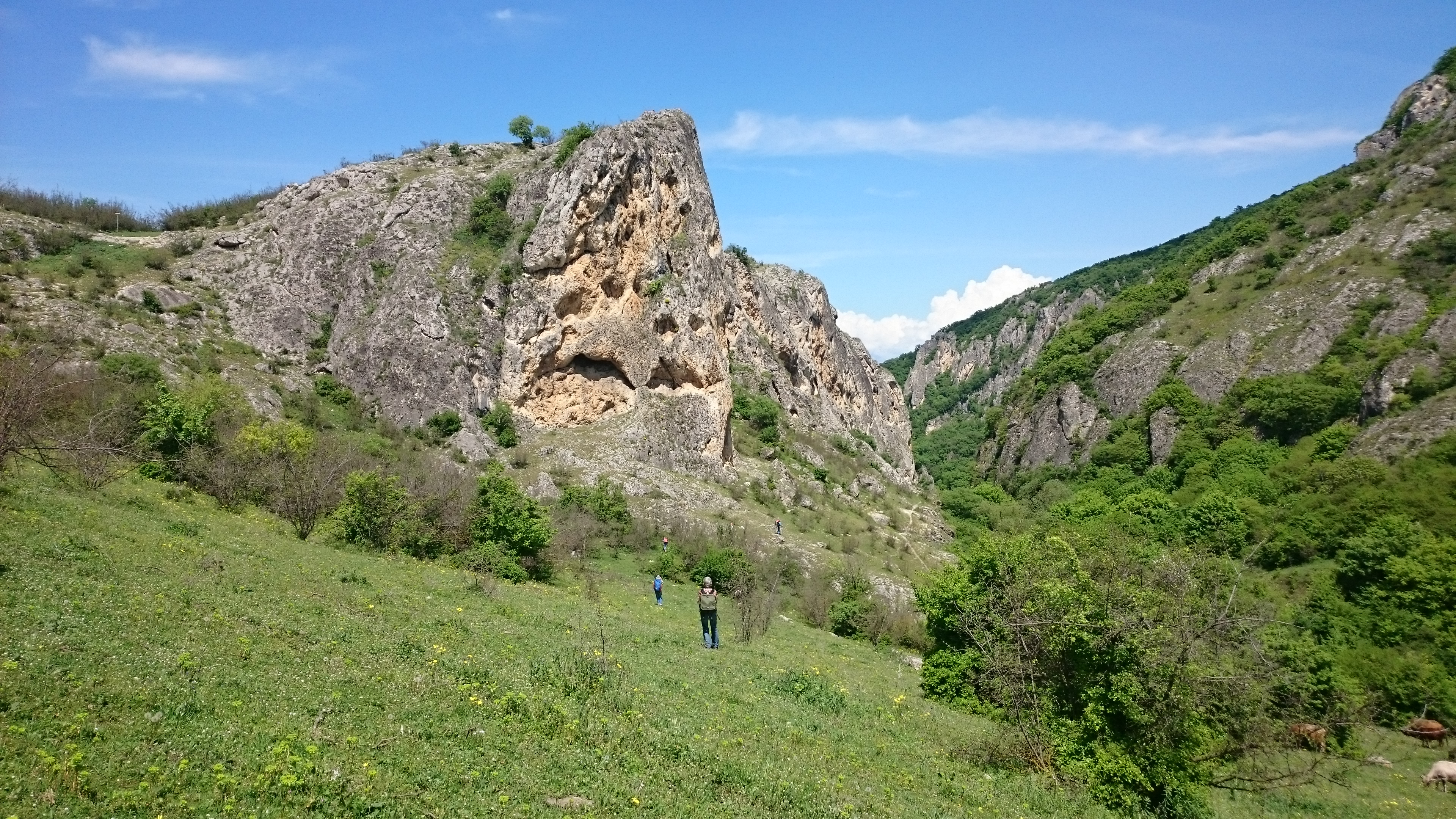 ლაშქრობა დედოფლისწყაროს რაიონში, არწივის ხეობაში